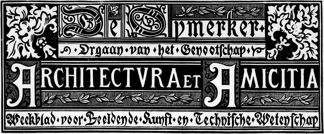 Andriaan Willem Weissman. Vignet van De Opmerker. 18e jaargang, nummer 1 (6 januari 1883).